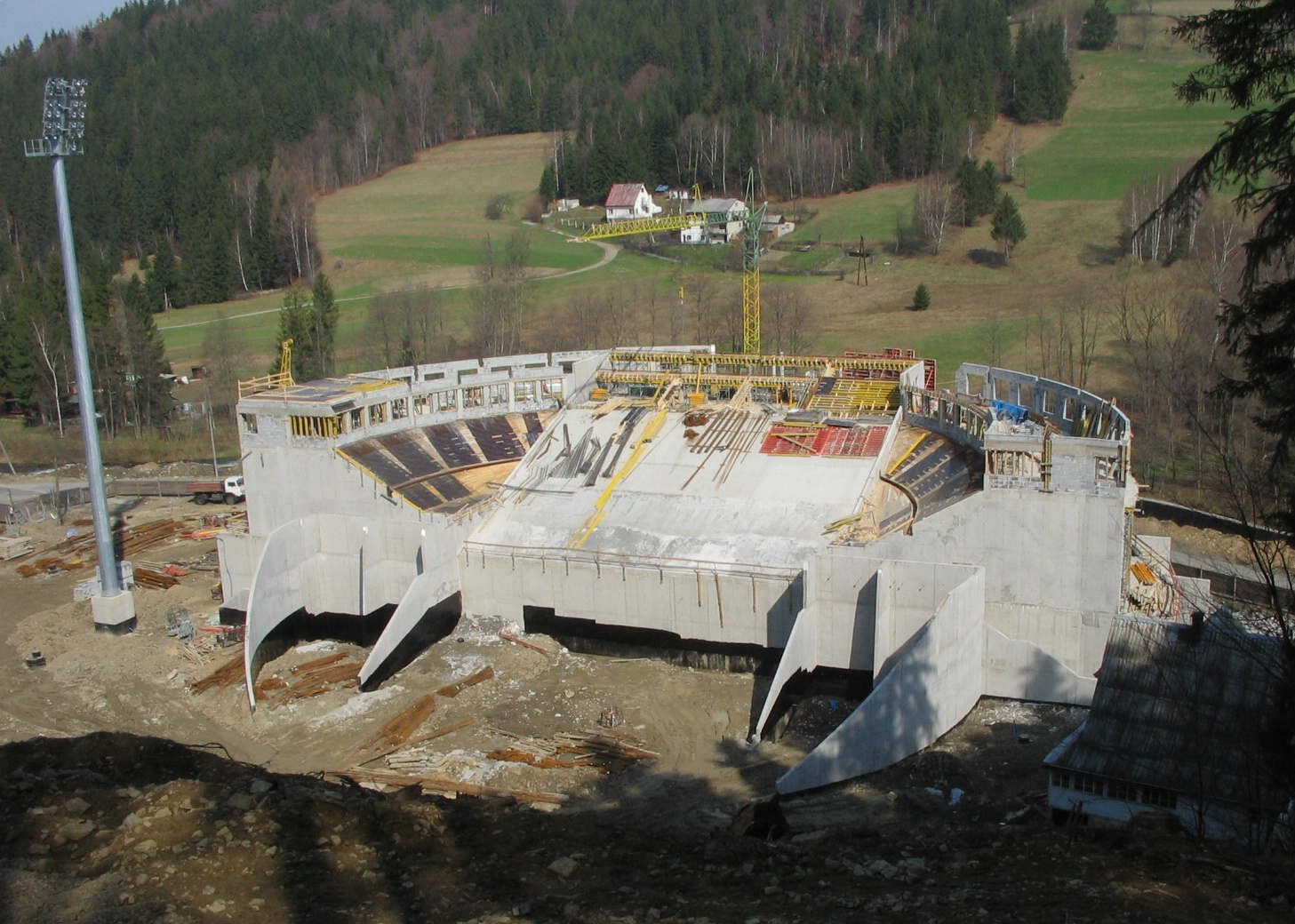 Skocznia narciarska w Wiśle Malince - w budowie - widok z góry